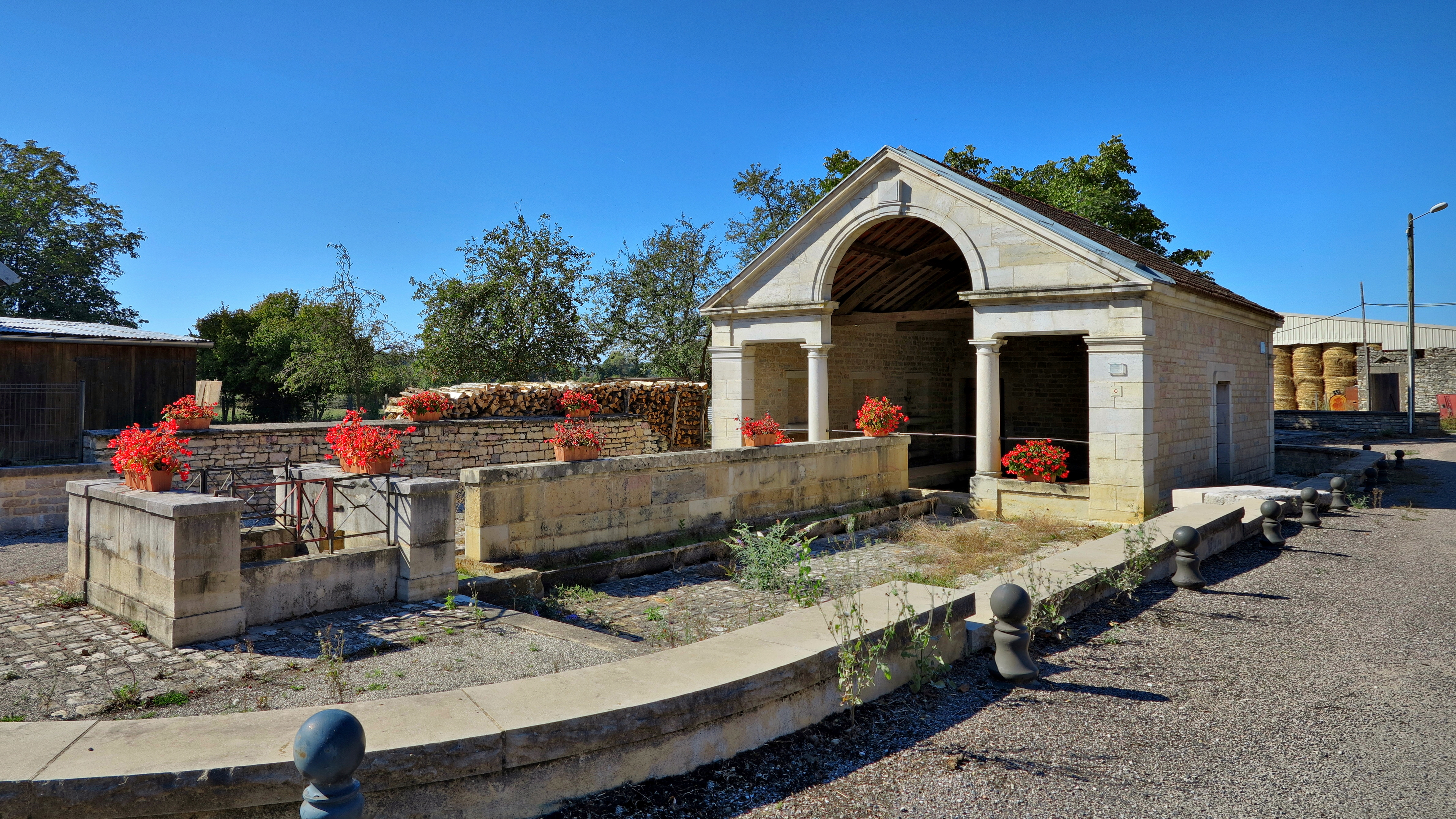 La fontaine-lavoir .